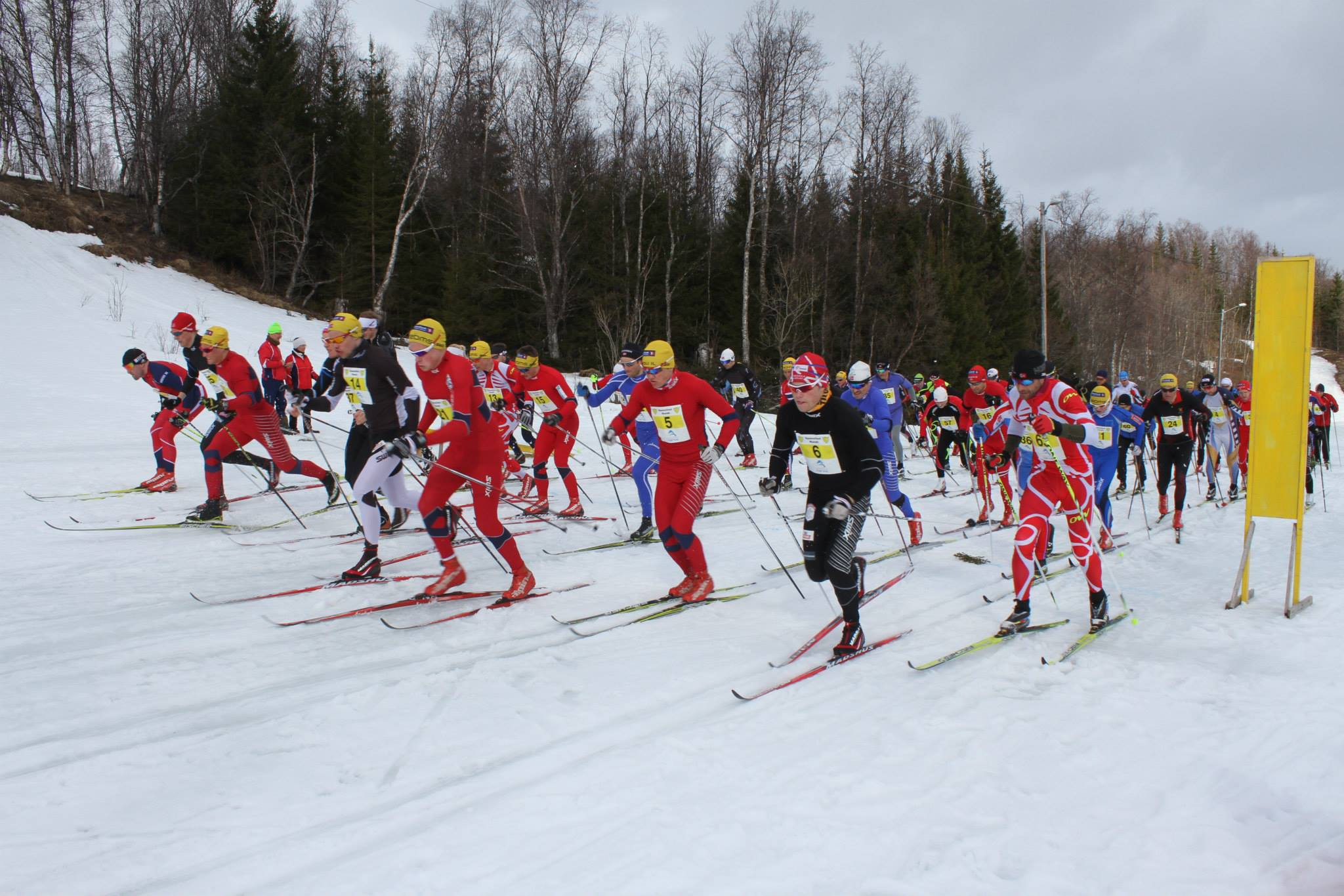 Felles start i turrenn klasen på Spanstind Rundt 2014